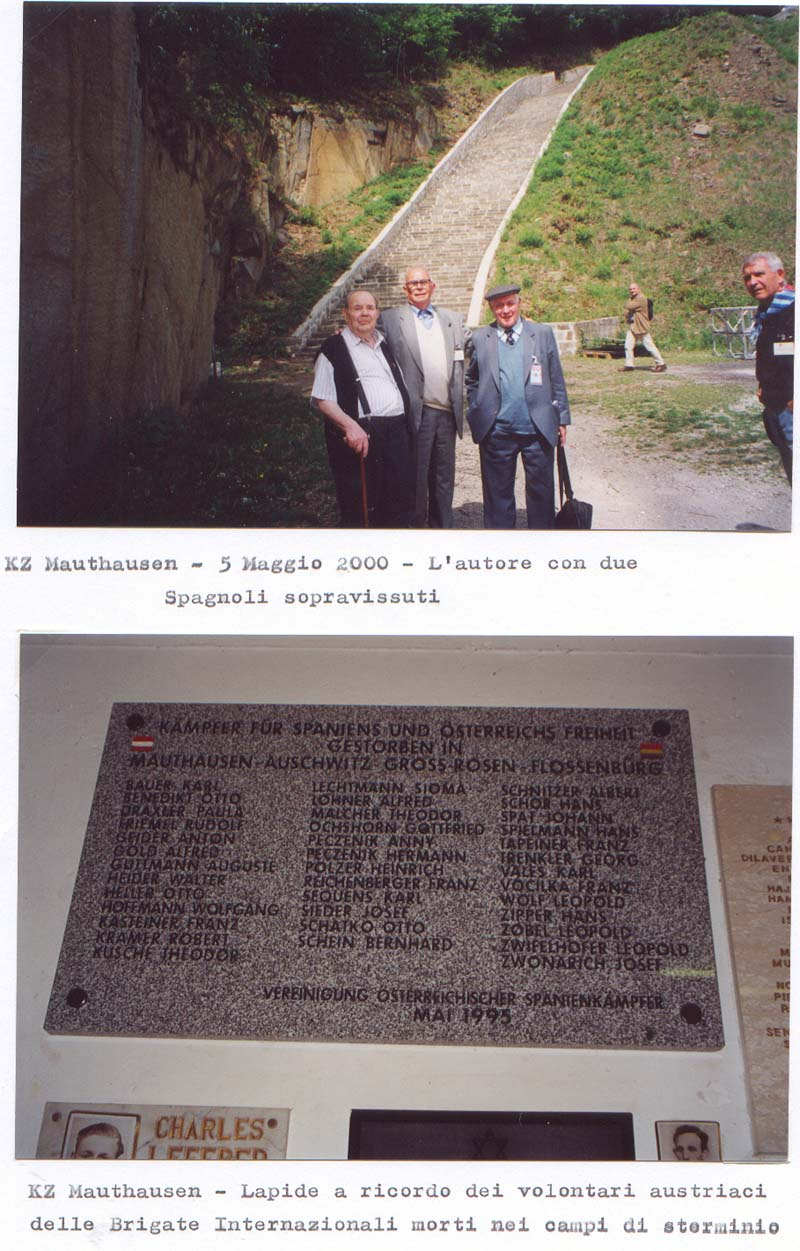 lo storico italiano Pietro Ramella , autore del libro La Retirada , con due spagnoili sopravissuti ai campi di concentramento